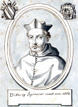 Retrato del Cardenal Diego de Espinosa